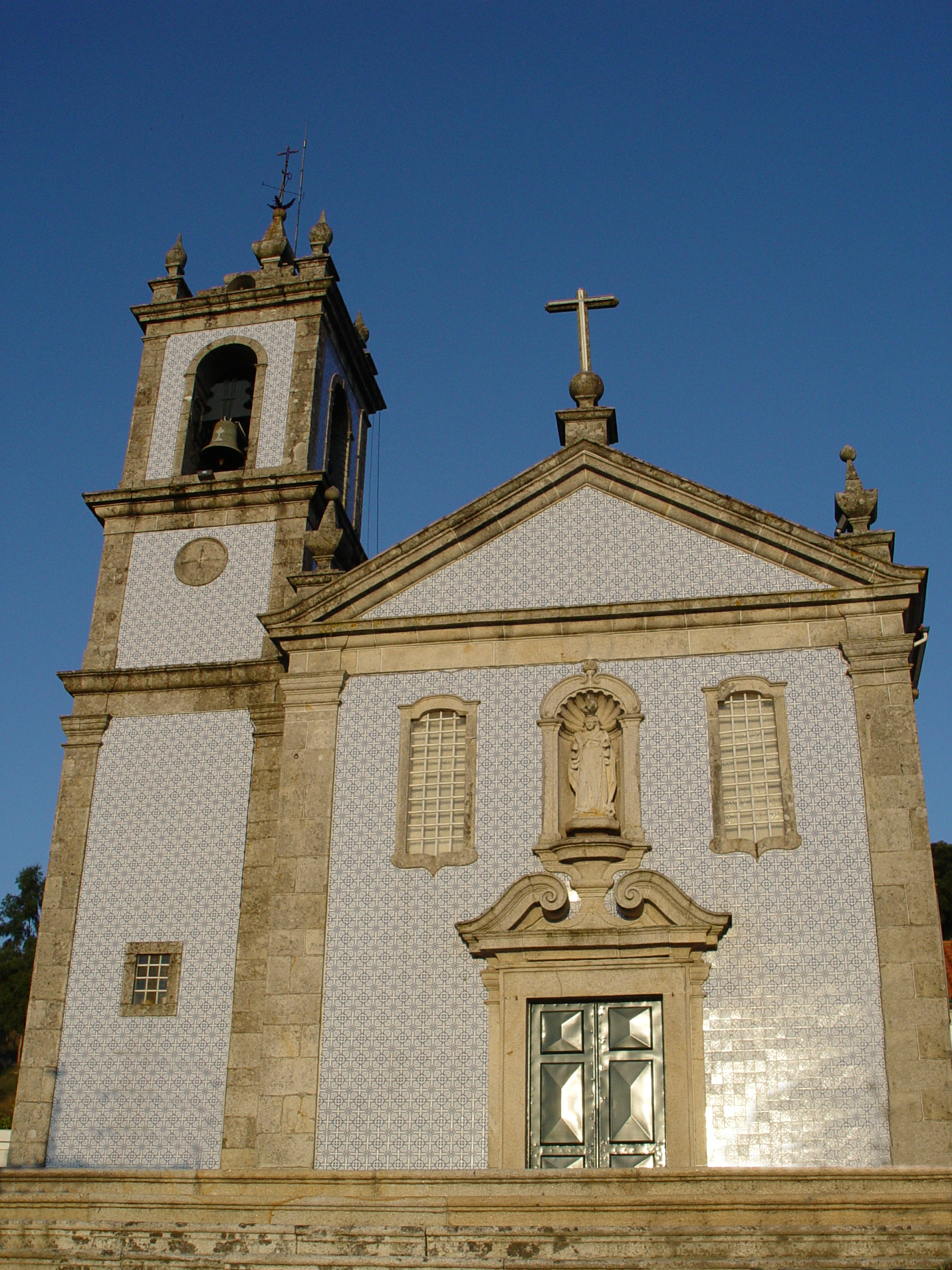 Sequeira Church, in Braga, Portugal